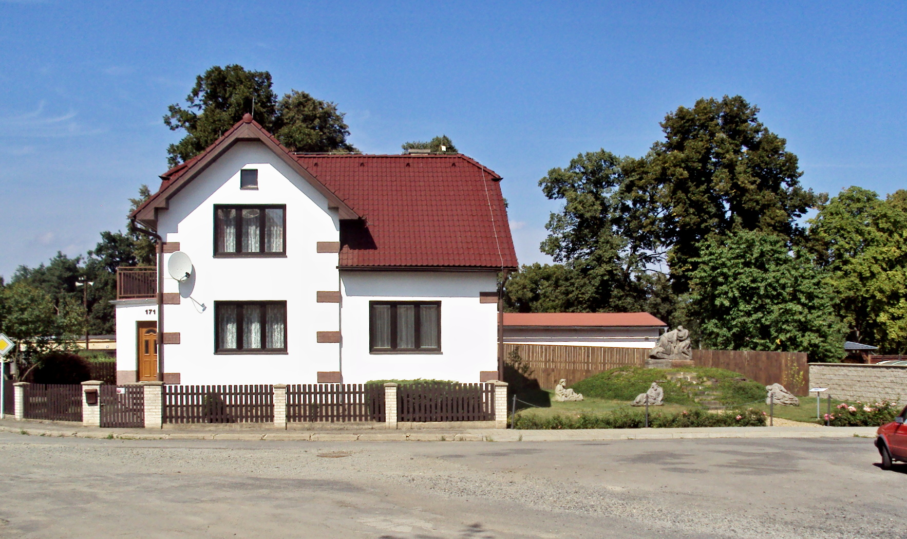 Getsemanská zahrada na trase Poutní stezky Mimoní